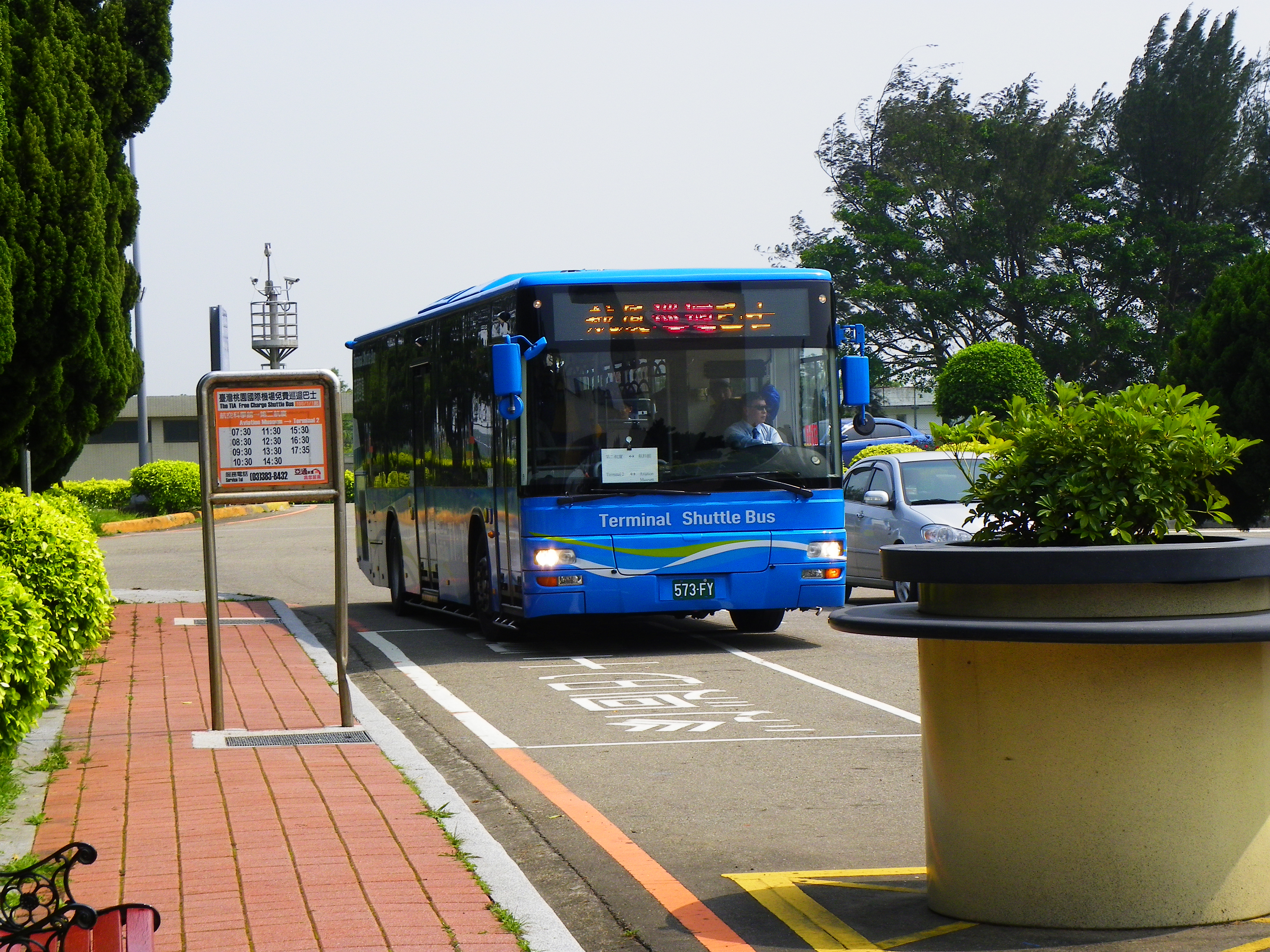 2014年3月30日下午1時19分，航空科學館站的桃園國際機場航廈巡迴巴士。